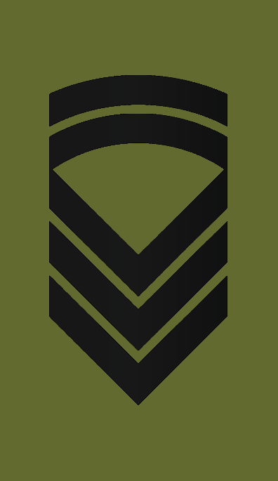 Distinksjon Stabssersjant